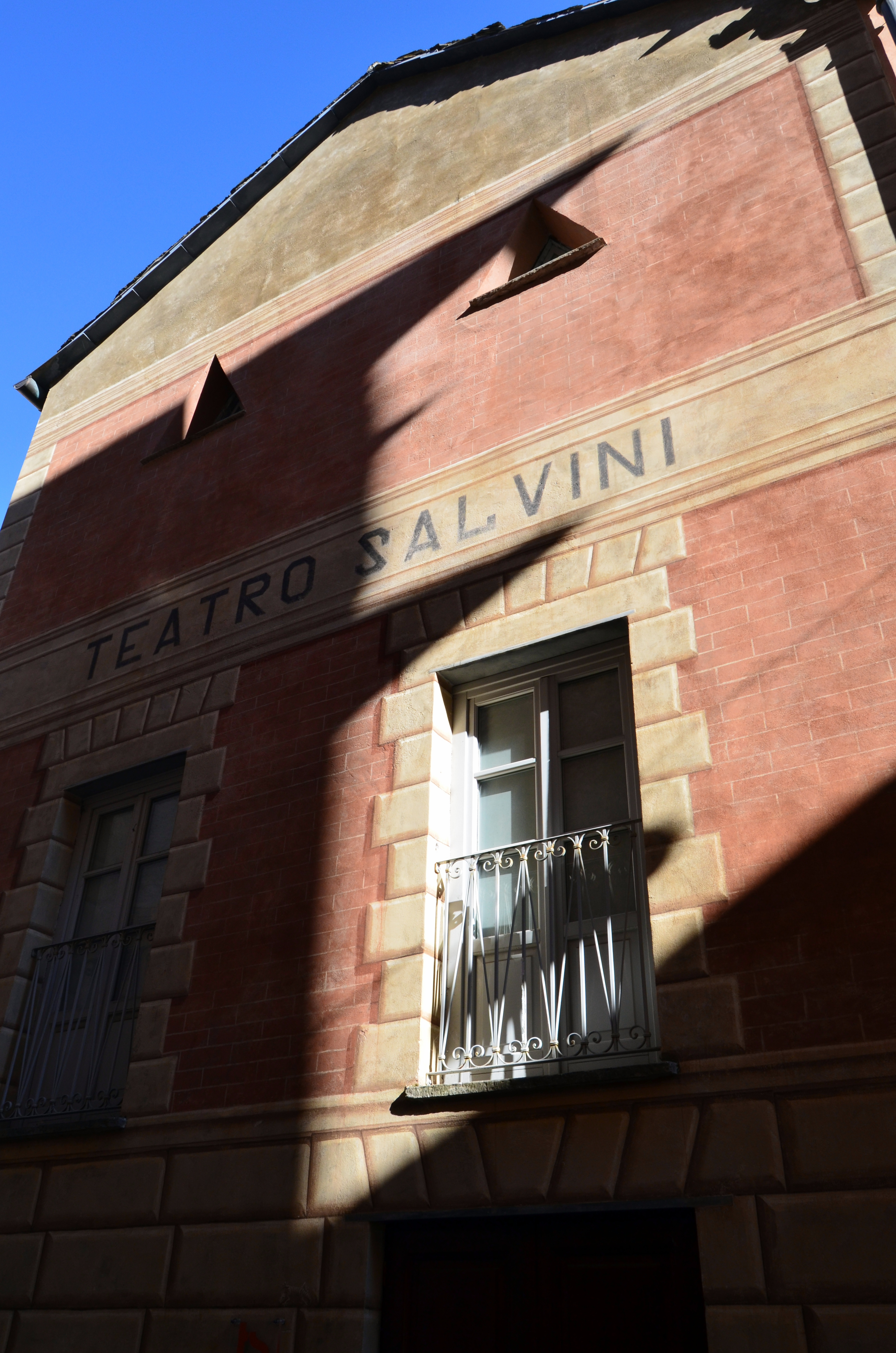 Il teatro civico Salvini, Pieve di Teco, Liguria, Italia